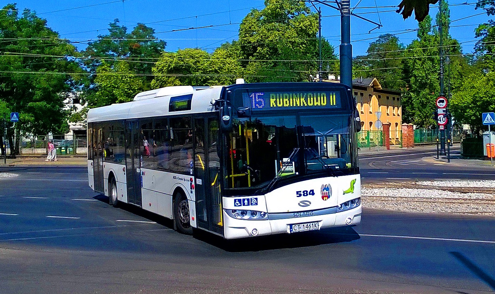 Solaris Urbino 12 w Toruniu